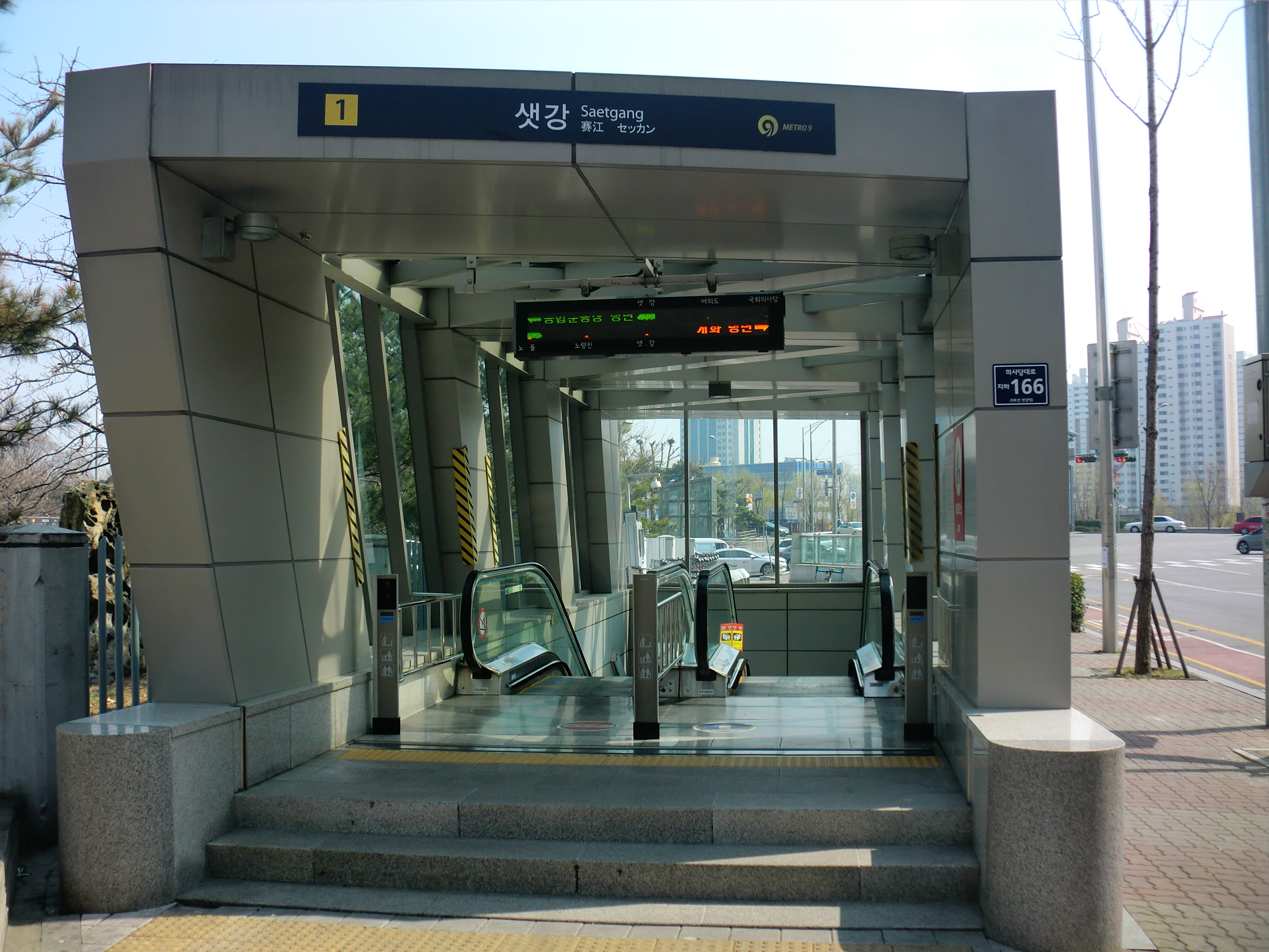 메트로 9 샛강역 1번출입구